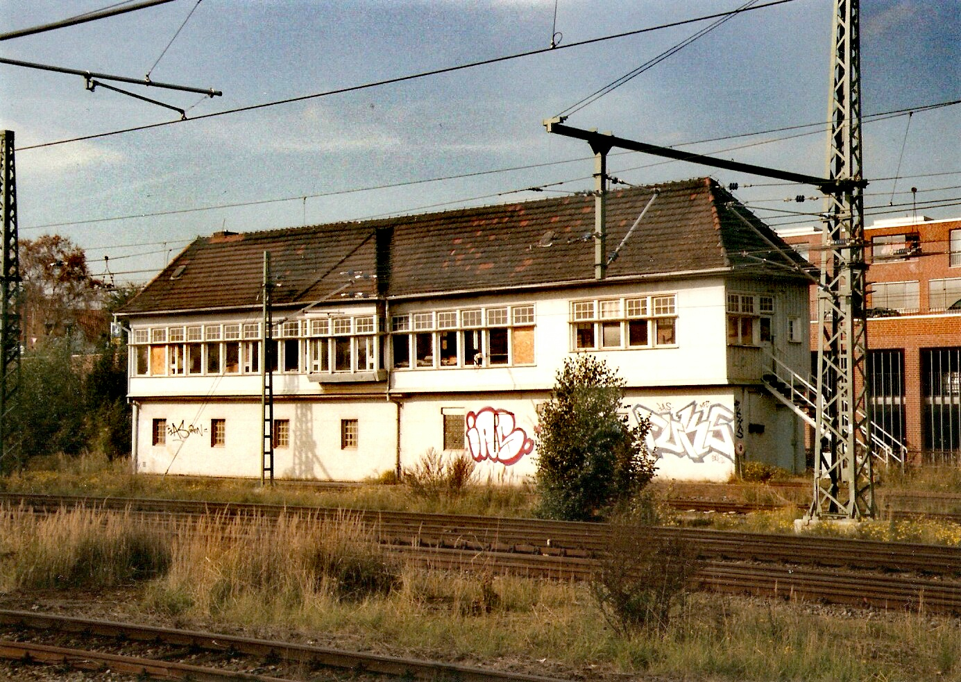 außer Dienst gestelltes Stellwerk